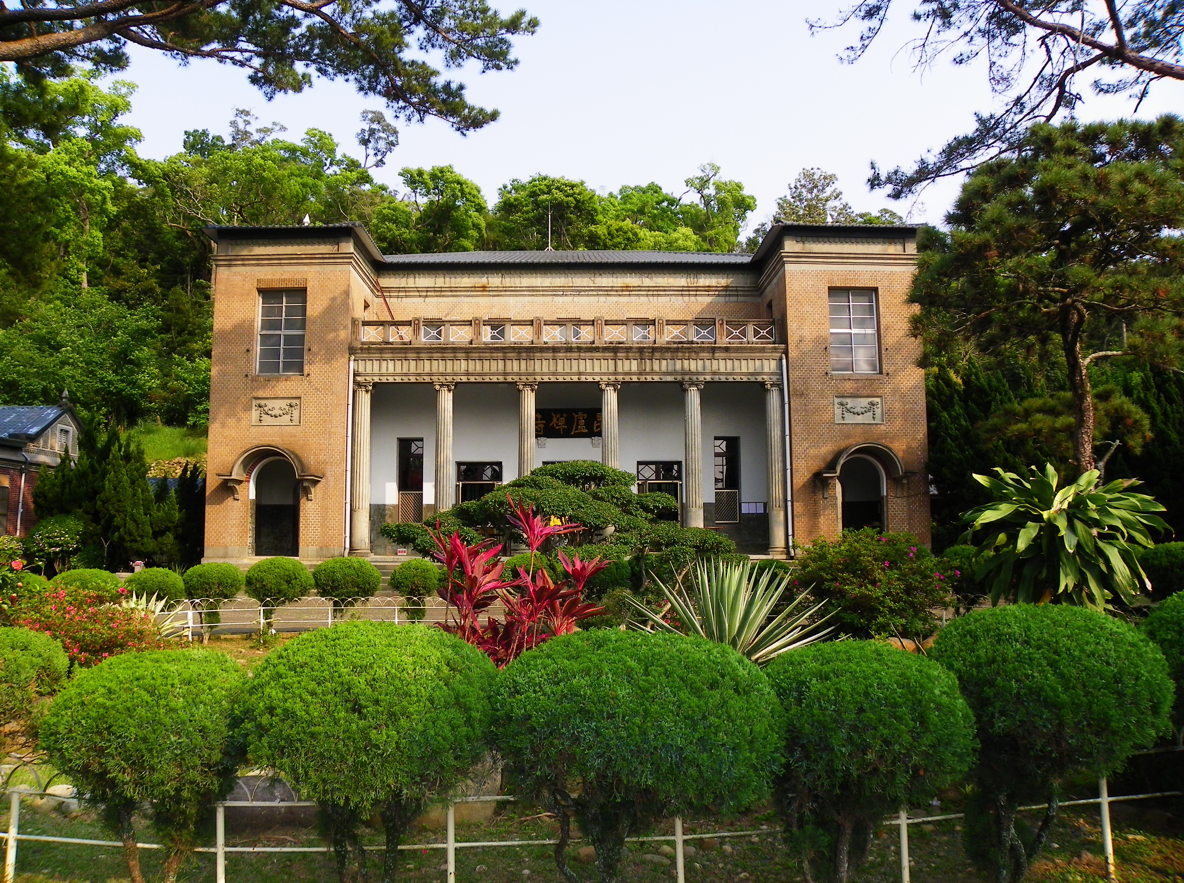 中文（台灣）: 臺灣省臺中縣后里鄉（今臺中市后里區）毘廬禪寺正殿前。